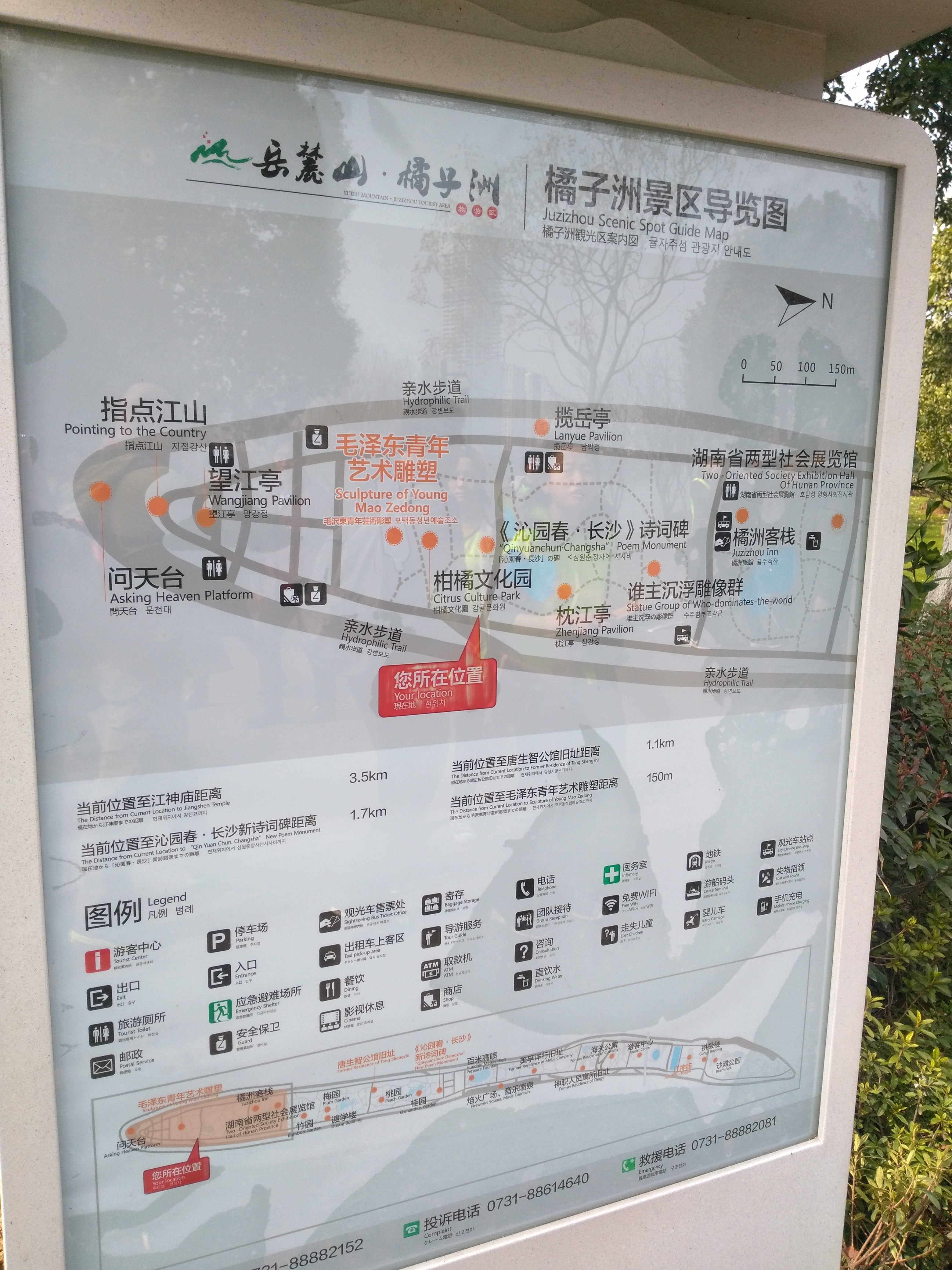 位于长沙市橘子洲景区内的一块导览图